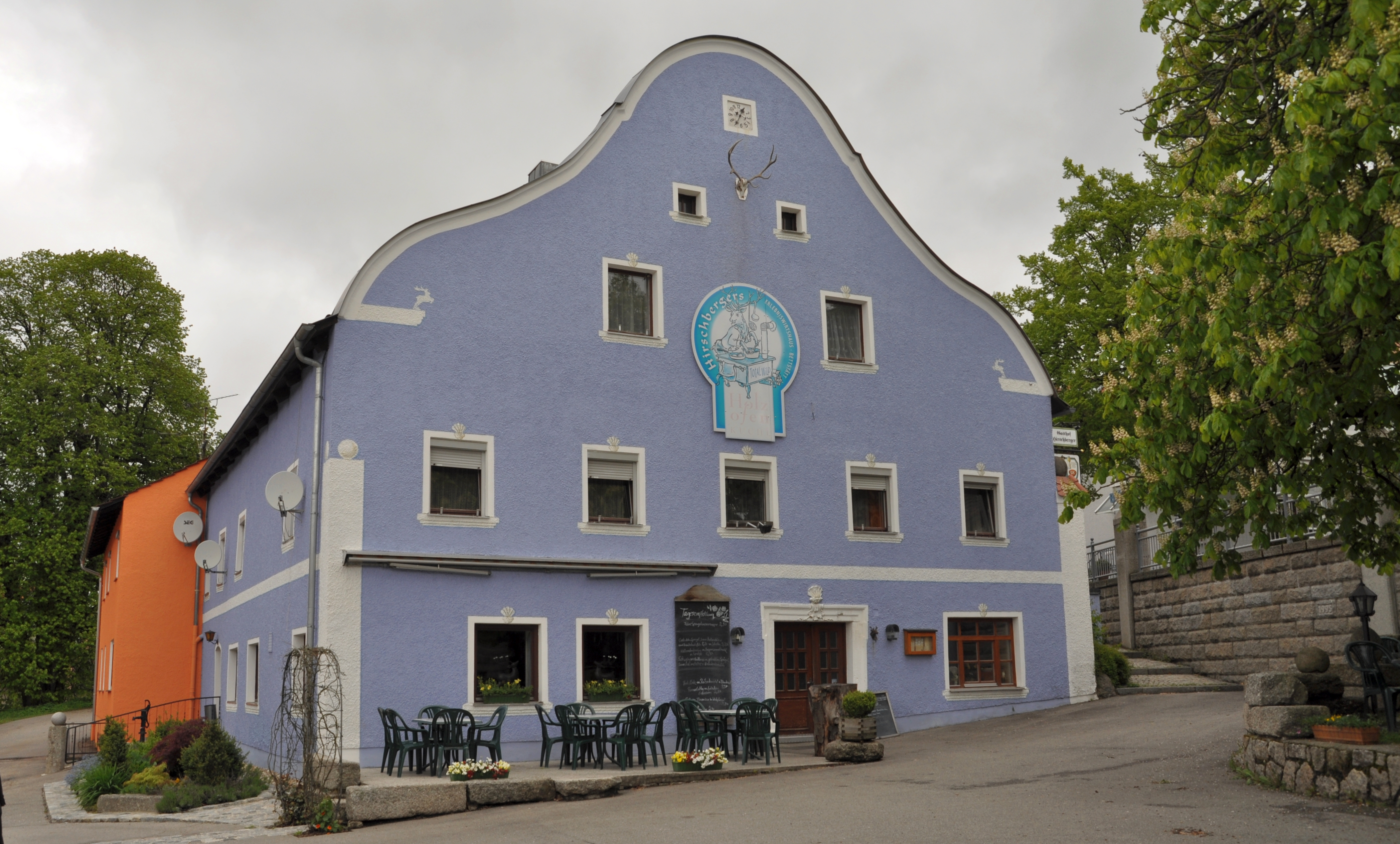 Gebäude in Brennberg (Oberpfalz, Bayern), Gasthaus Hirschberger